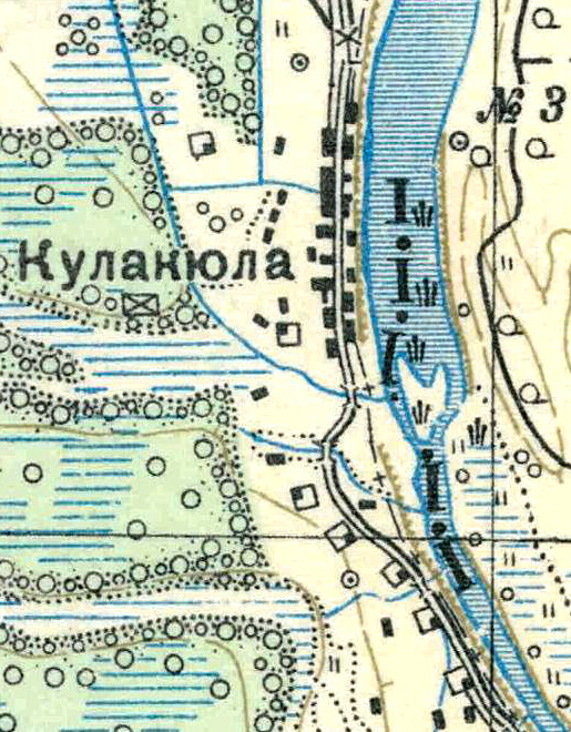 Топографическая карта Ленинградской области, квадрат О-35-21-А-г (Волково), деревня Кулла.